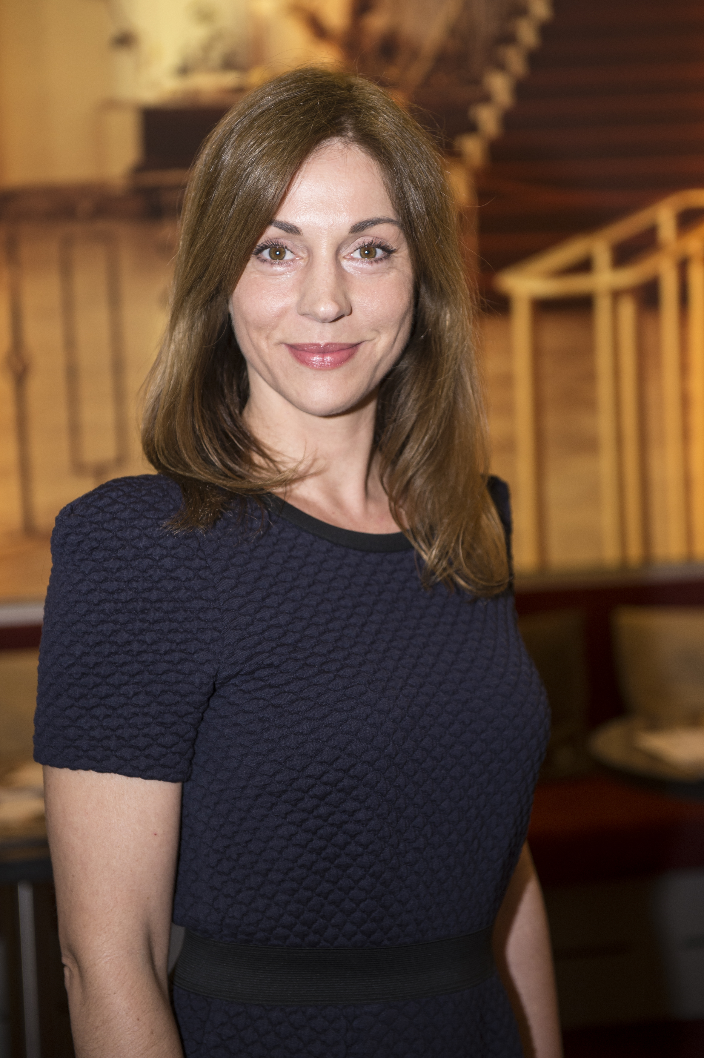 Bretonische Verhältnisse Premiere am 16.04.2014 in München Ulrike C. Tscharre